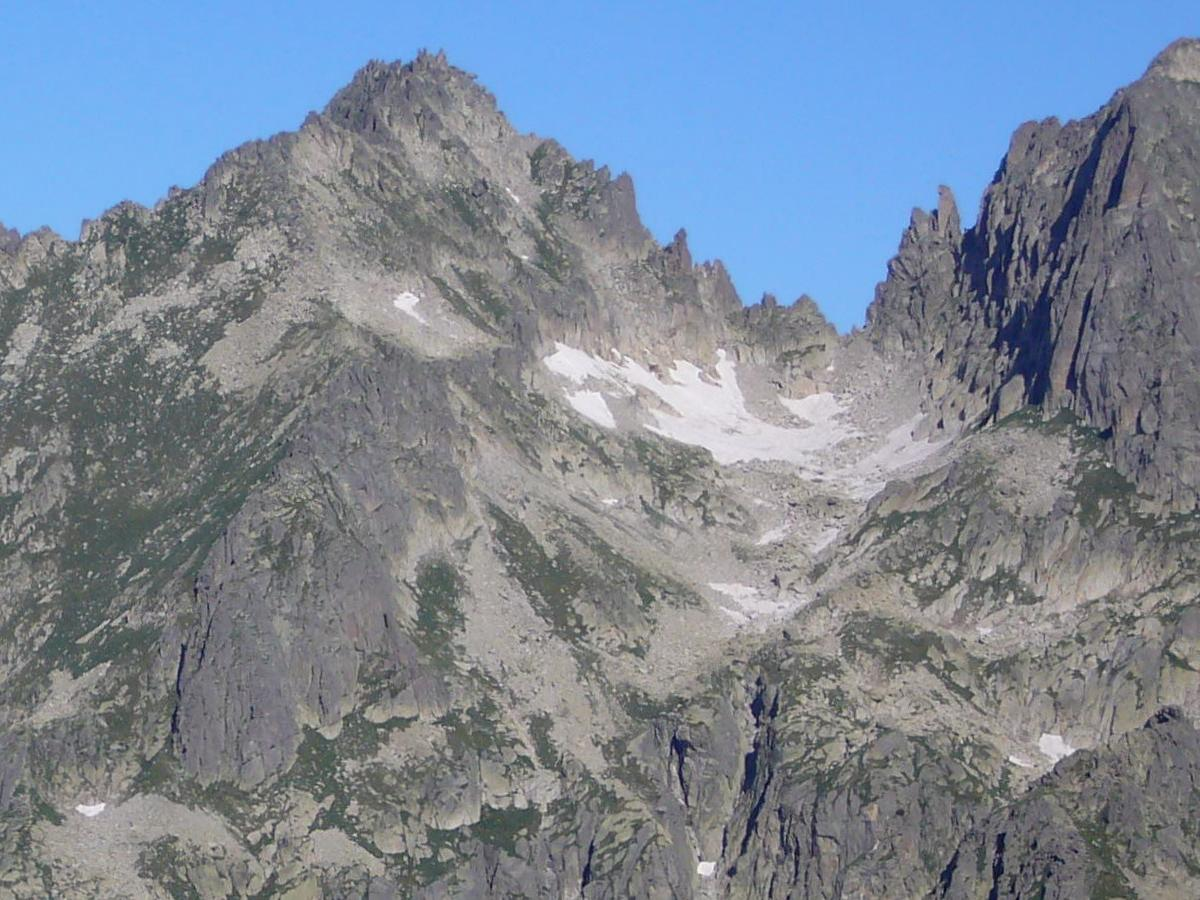 Punta i Coll d'Harlé, i Mussol de Tumeneia (Pyrenees); vistos des de la Vall de Colieto. La Vall de Boí, Alta Ribagorça, Catalunya